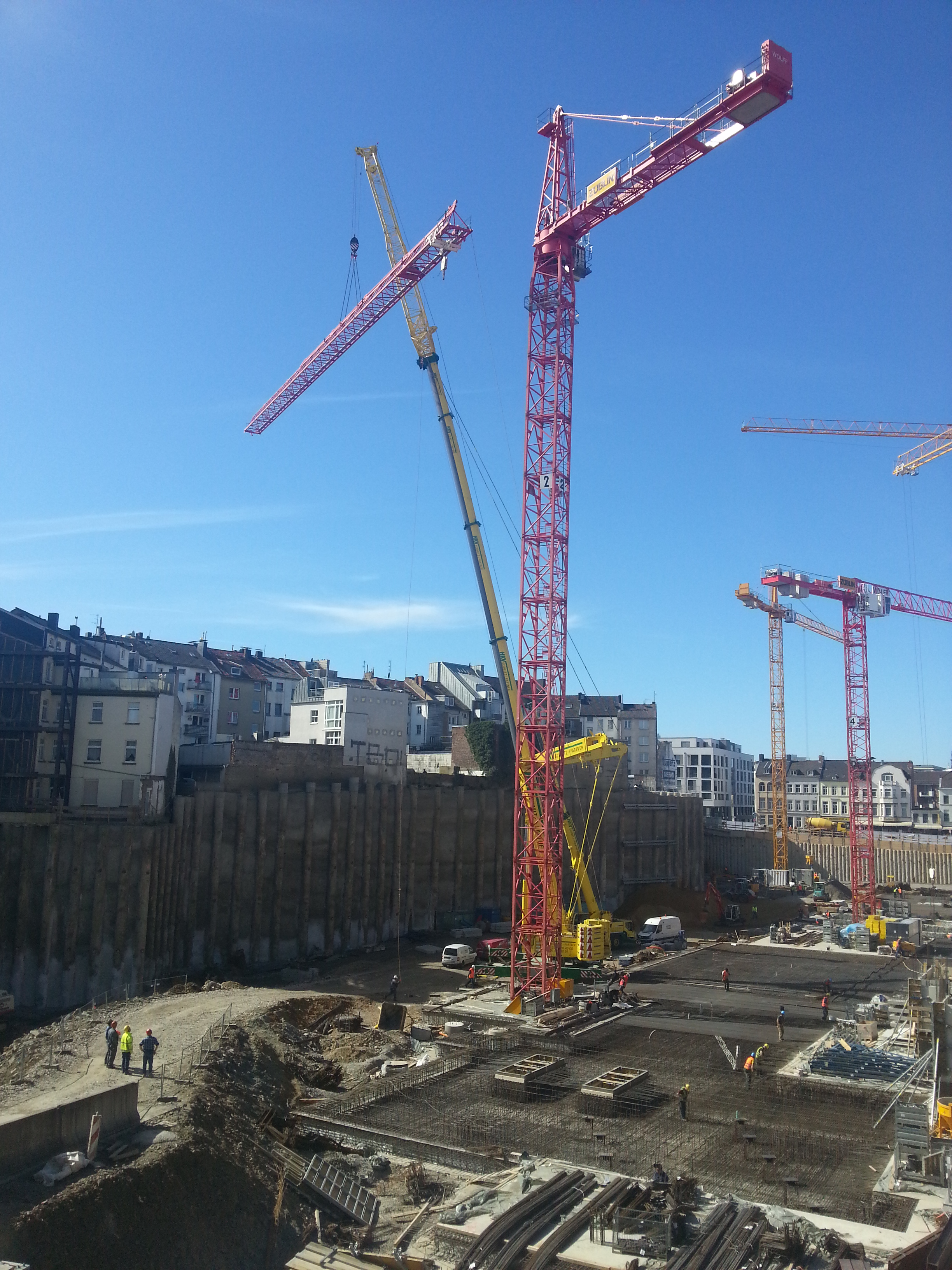 Montage eines Baukrans - Baustelle des Einkaufszentrums Aquis Plaza am Kaiserplatz in Aachen am 20. März 2014.